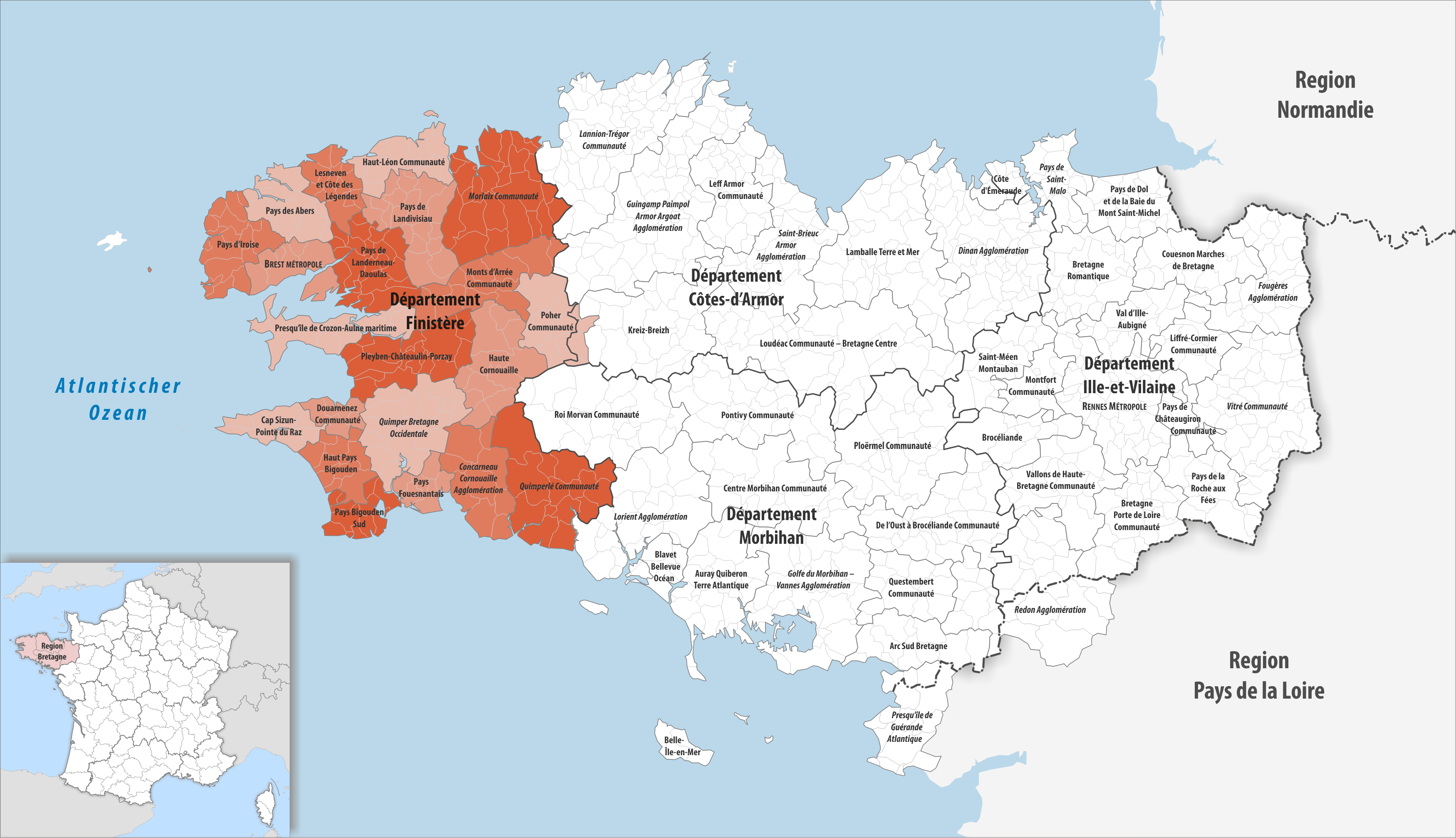 Gemeindeverbände im Département Finistère